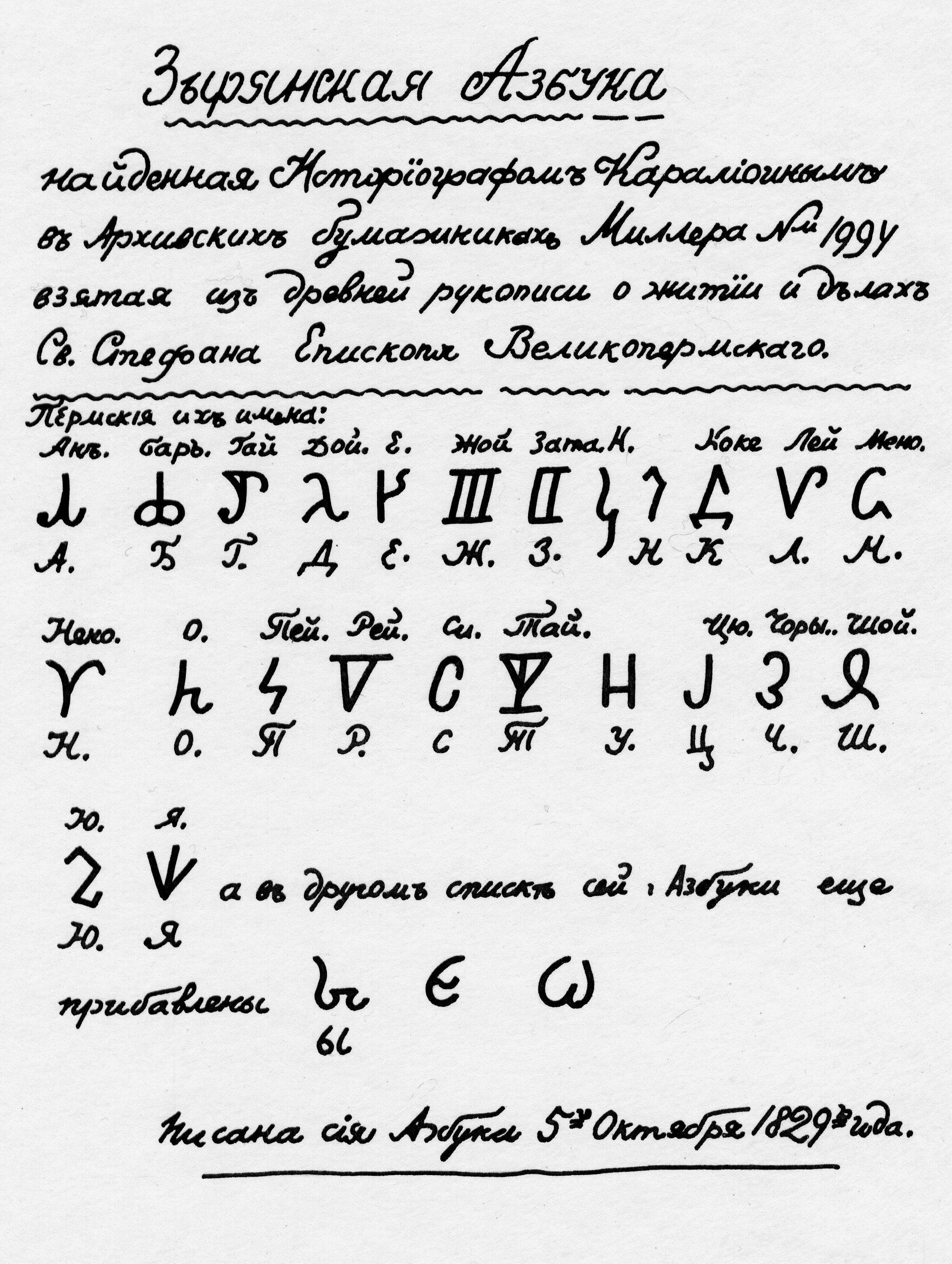 Карамзинский список зырянской азбуки 1829 г.